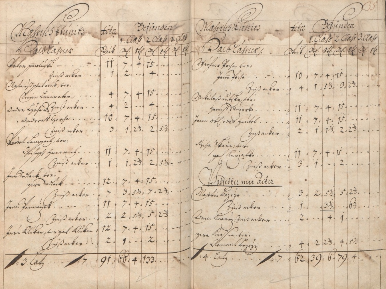 Lánový rejstřík, poř. č. 155, sign. 142, fol. 34v/35r, panství Veveří - obec Moravské Knínice (uloženo v Moravském zemském archivu)